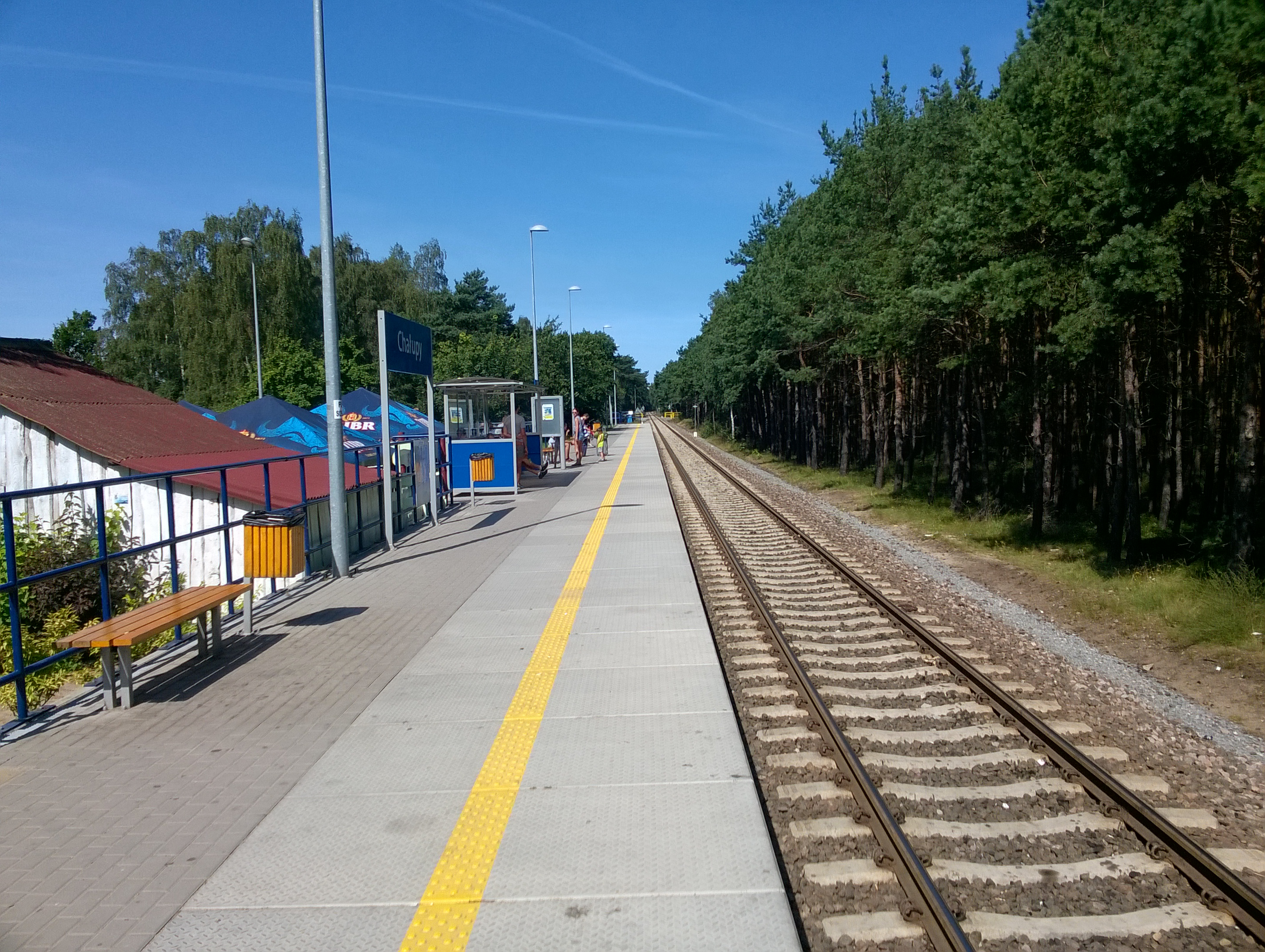 Przystanek osobowy Chałupy